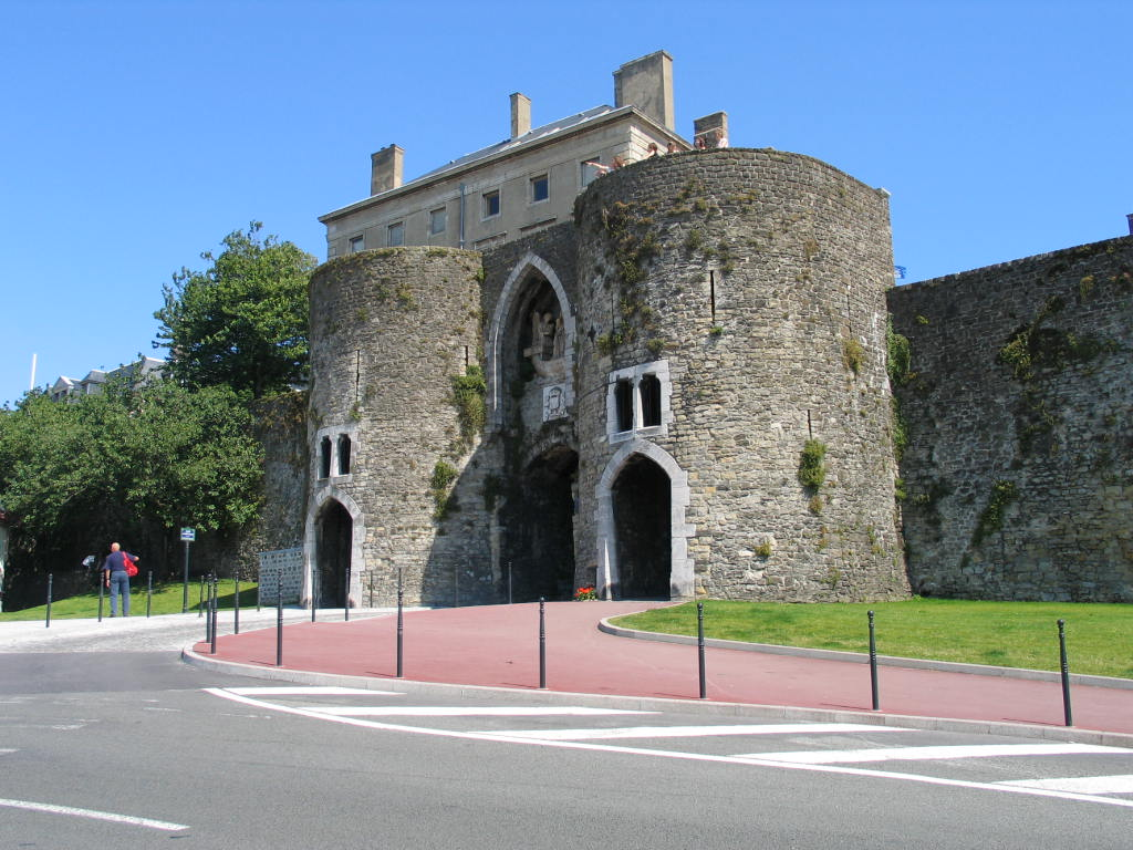 Porte des Dunes in Boulogne - eigen foto